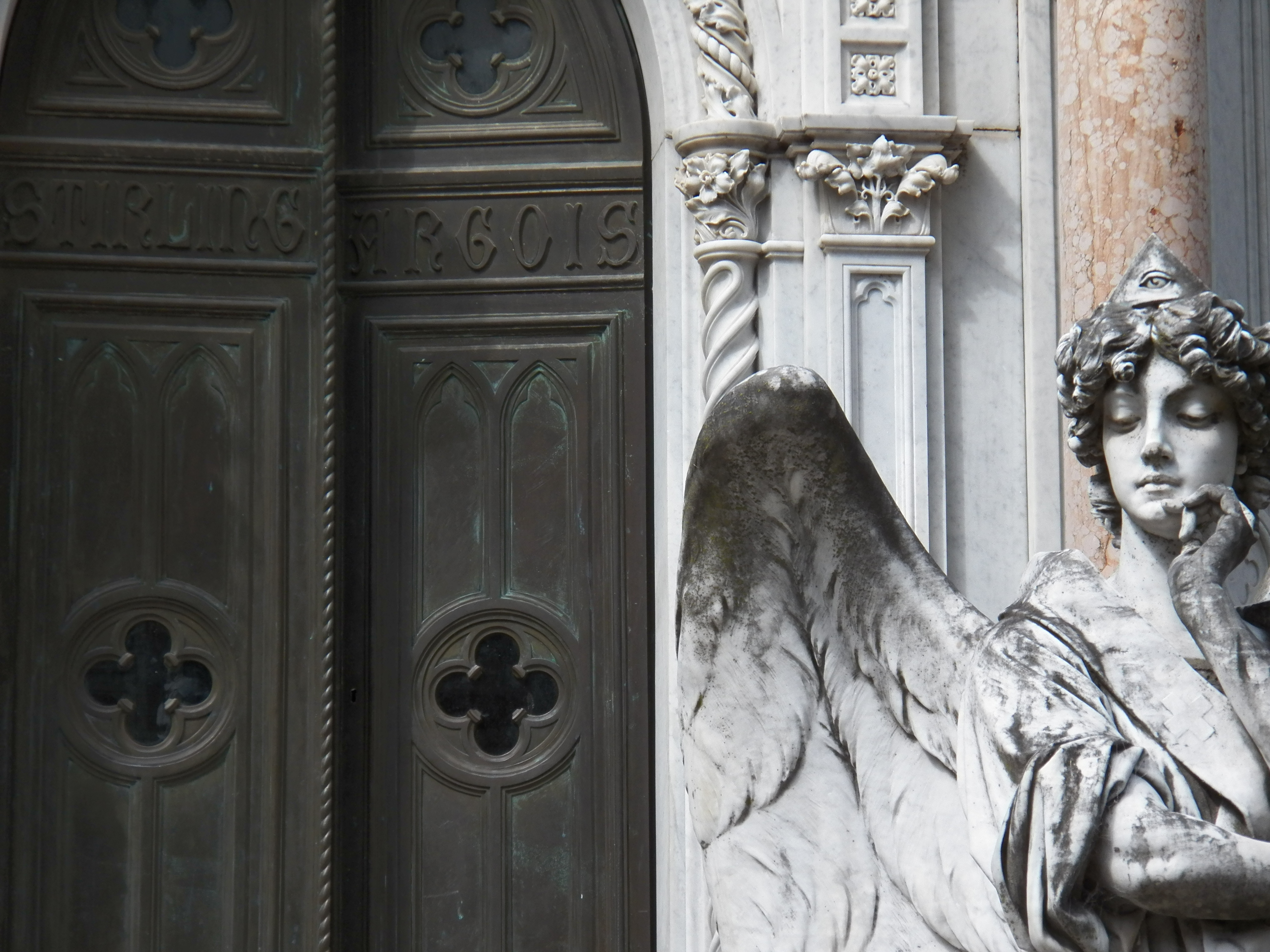 Estatua del arcángel Uriel, la representación del ojo de Dios es visible en la corona. Monumento a Perpetuidad o Cementerio Viejo. Ubicada en el departamento de Paysandú.